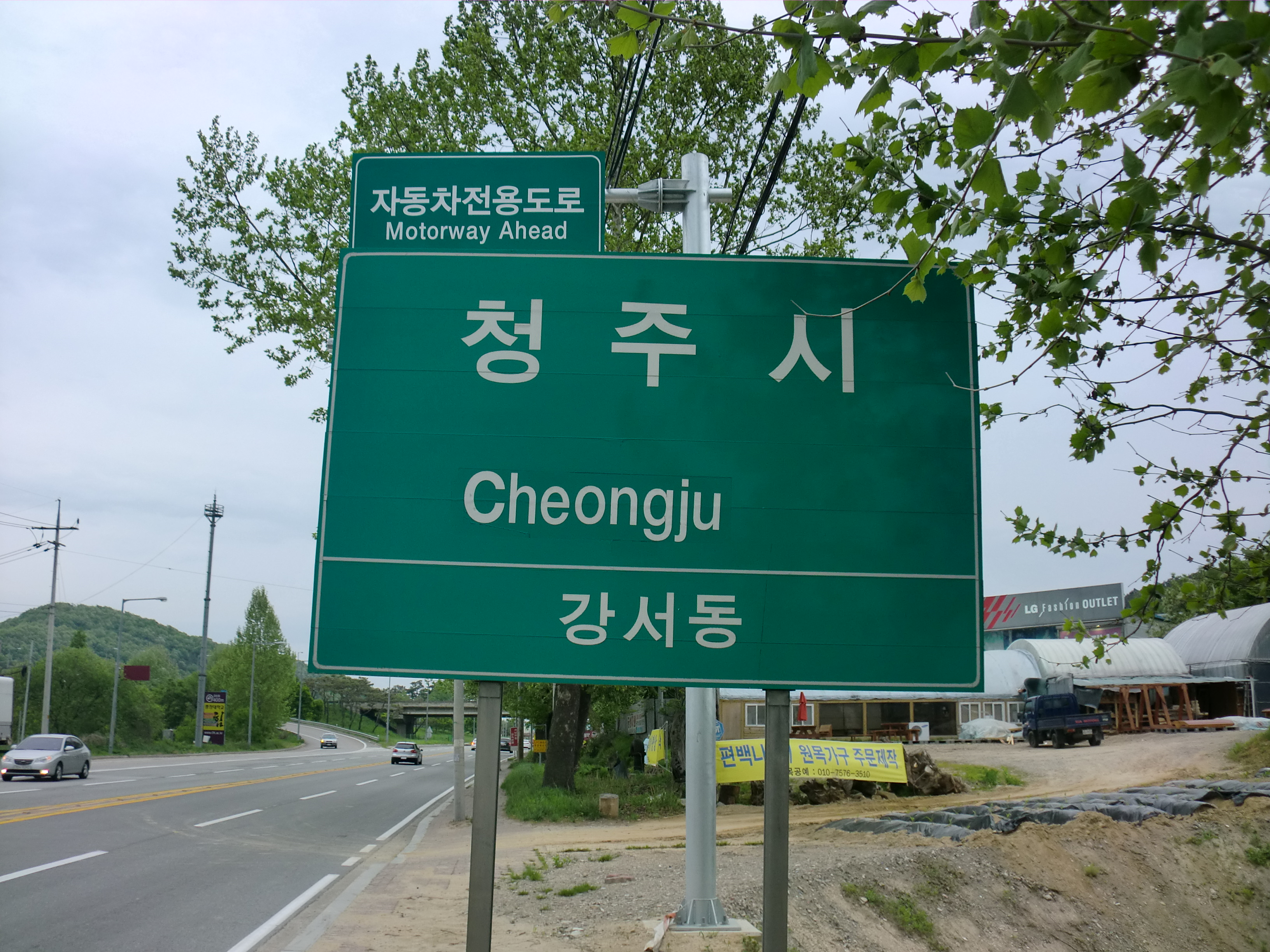 국도36호선에 있는 청원군 강내면과 청주시의 경계